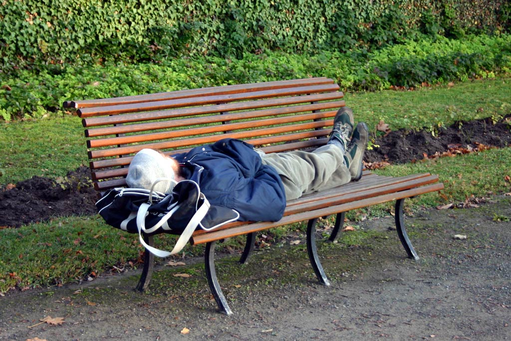 Obdachloser auf einer Parkpark